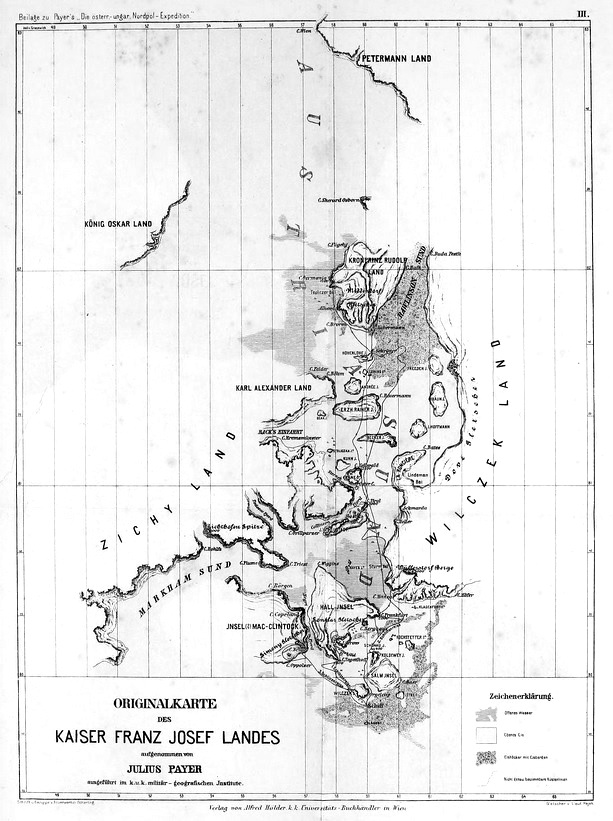 Julius Payers Karte Franz-Josef-Lands, gezeichnet nach der österreichisch-ungarische Nordpol-Expedition 1872-1874